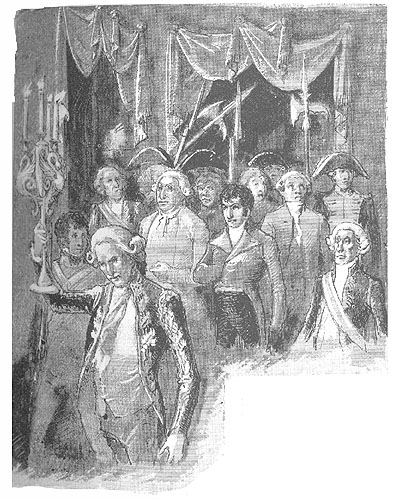 Ilustración de "La corte de Carlos IV" de Galdós. Ilustraciones de Enrique y Arturo Mélida, edición de La Guirnalda y Episodios Nacionales, 1882.